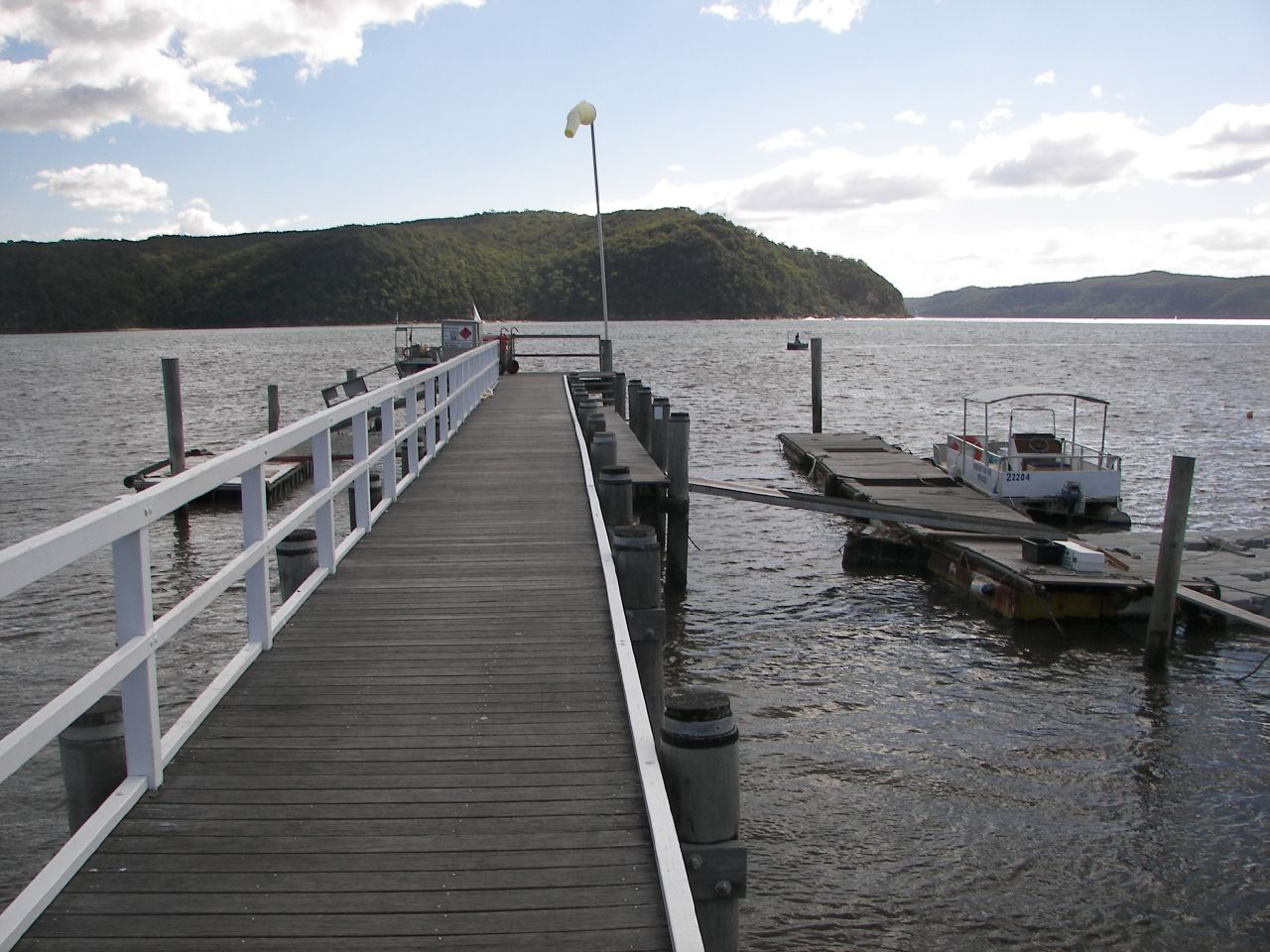 Palm Beach Sydney